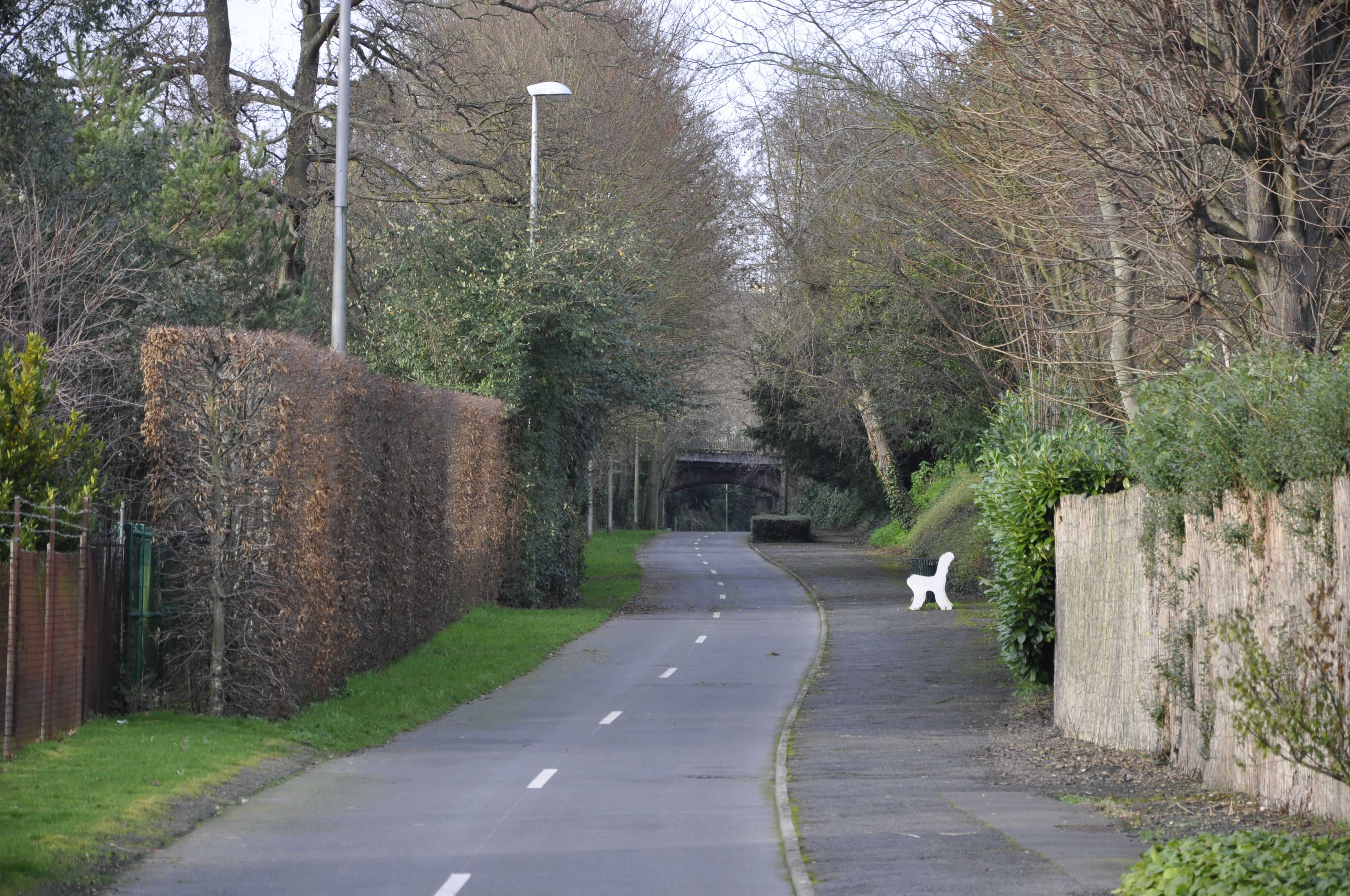 promenade Napoleon Ier à Caen, ancienne plateforme ferroviaire du raccordement de Caen à Courseulles